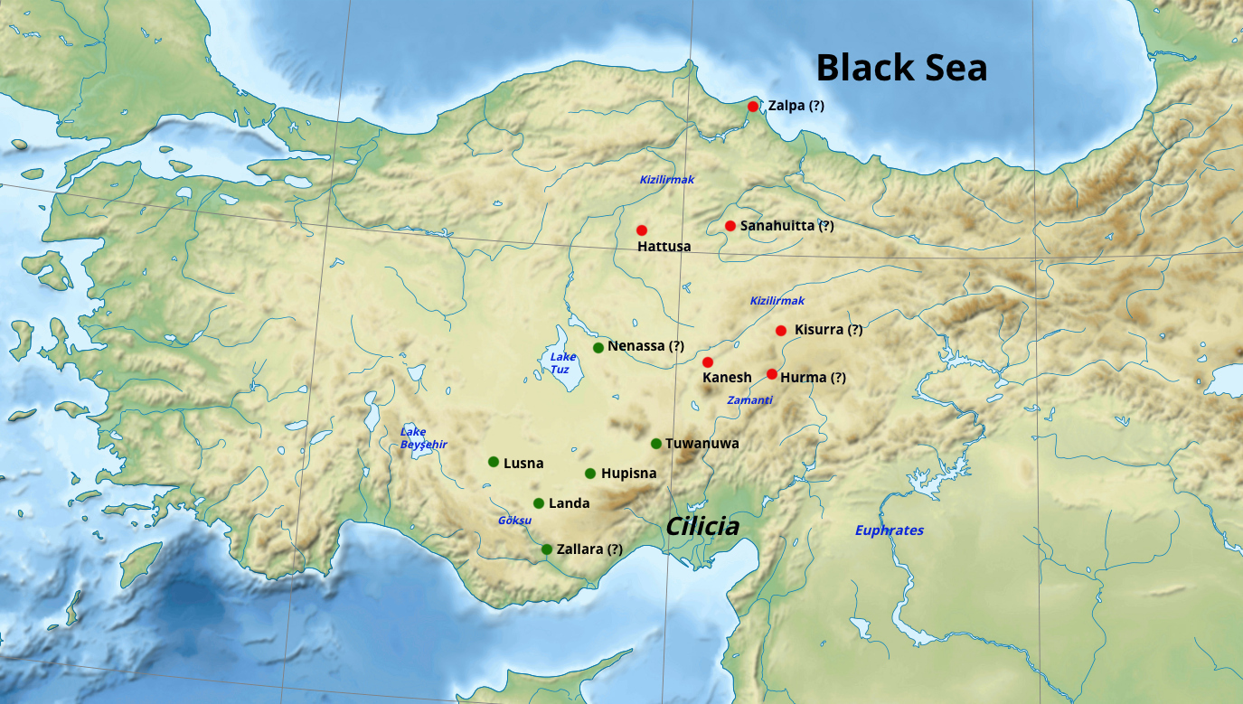 Map showing Labarna's conquests in Anatolia in the 17th century BC